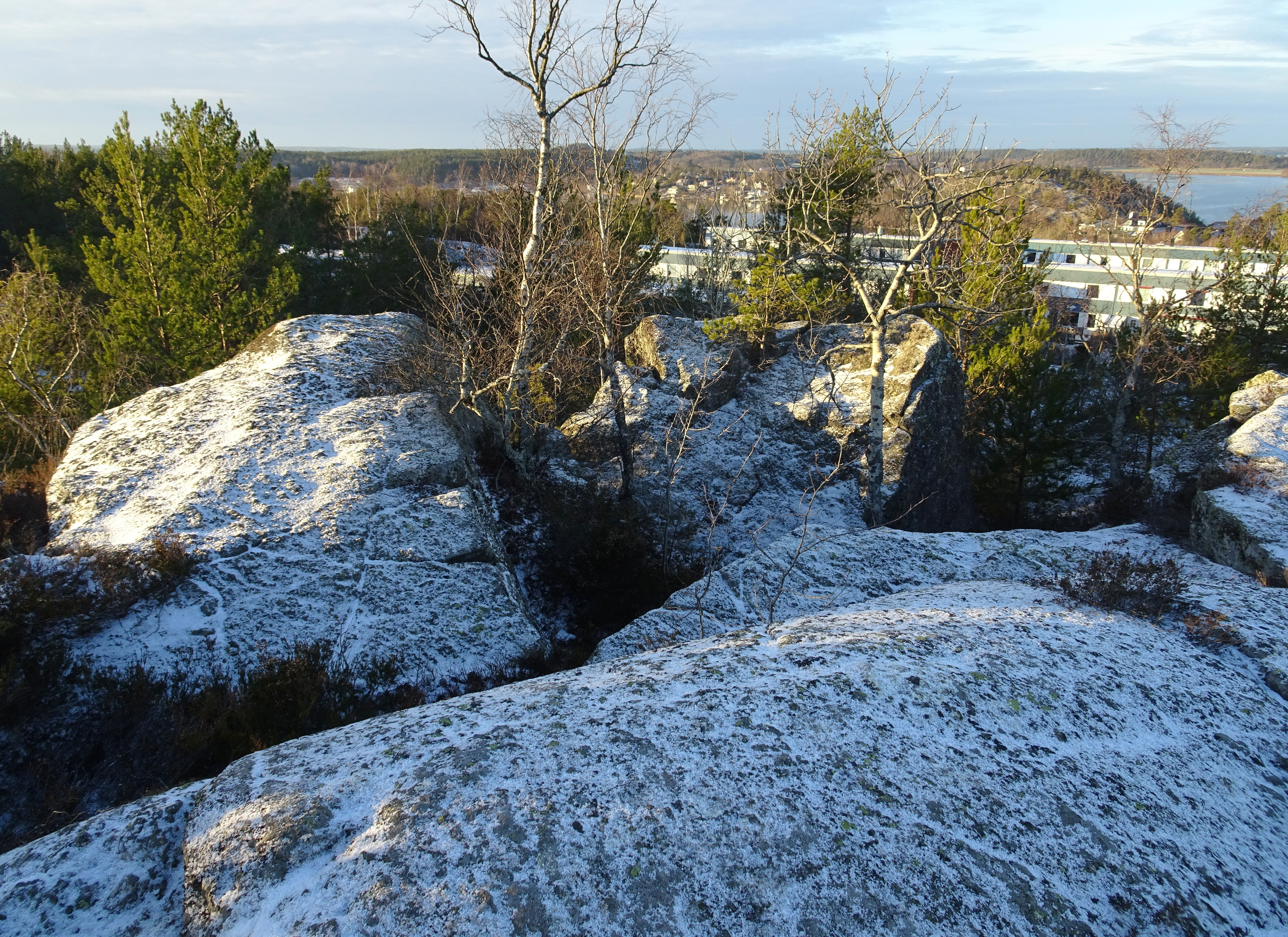 Vikingabergets topp